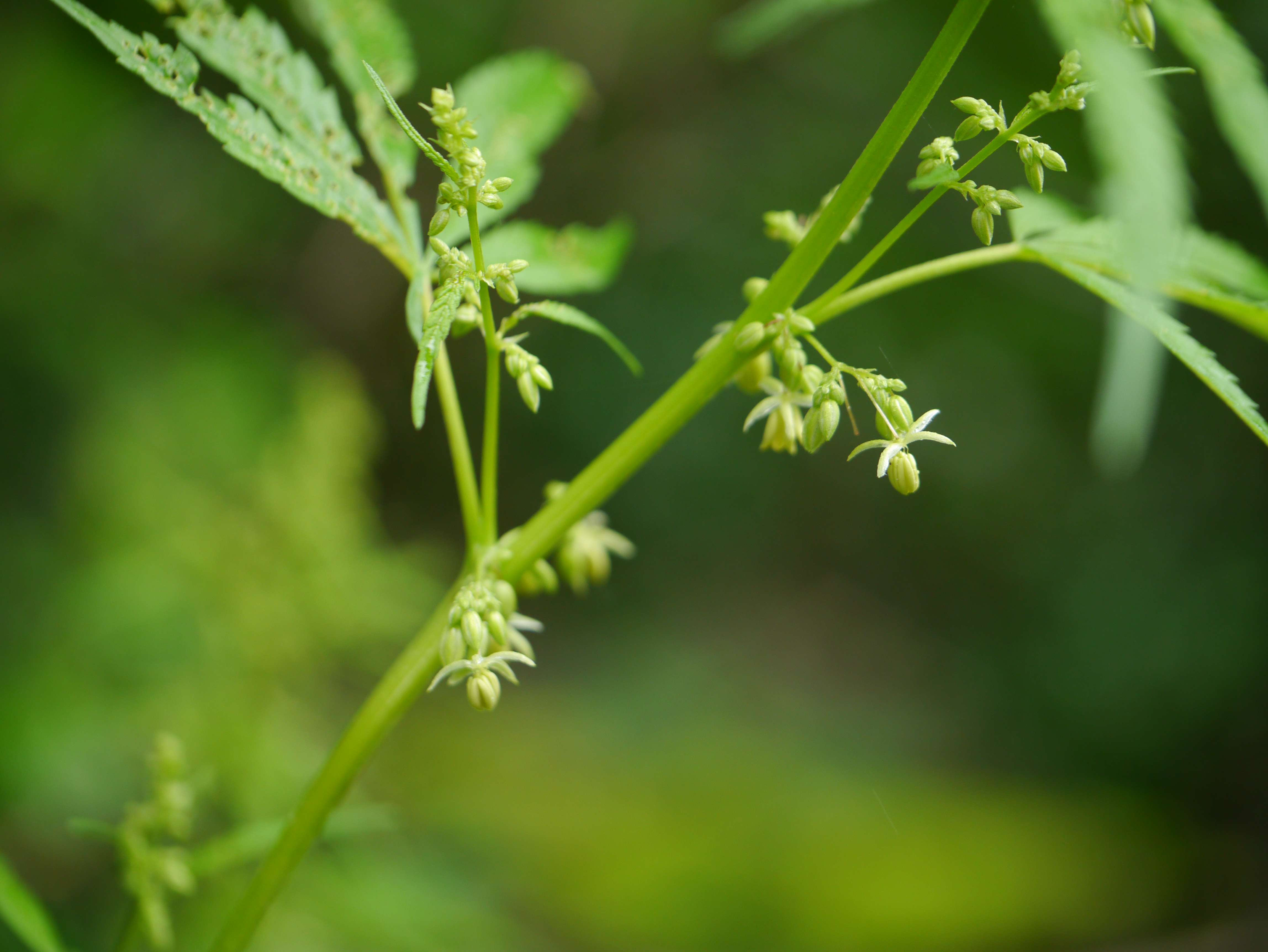 Cannabis sativa